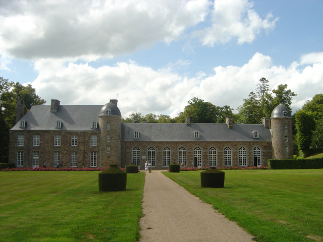 Façade avant du chateau de Pontécoulant